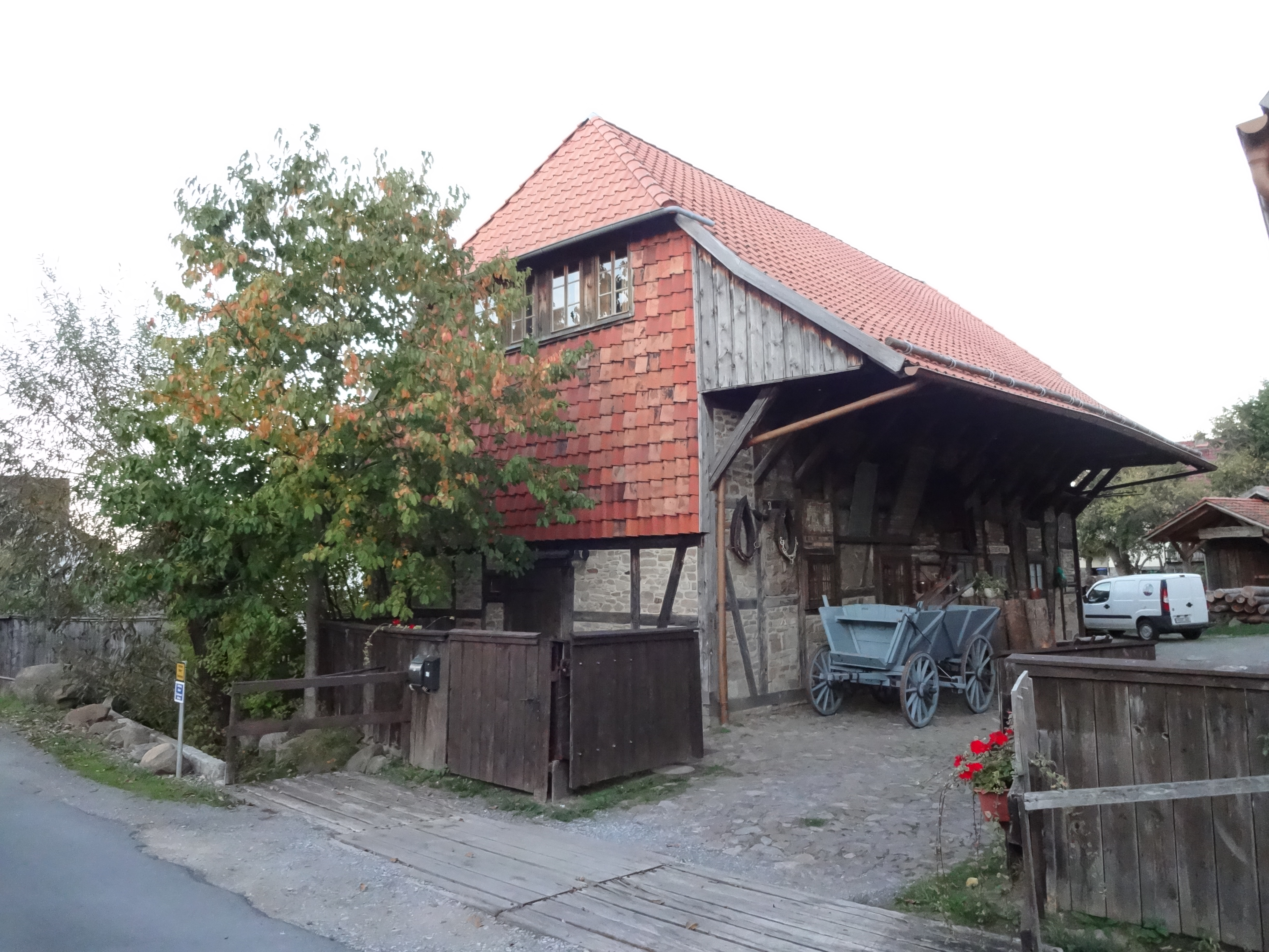 denkmalgeschützter Bauernhof in der Straße Im Winkel 3 in Darlingerode; Hof des Deutschen Ordens